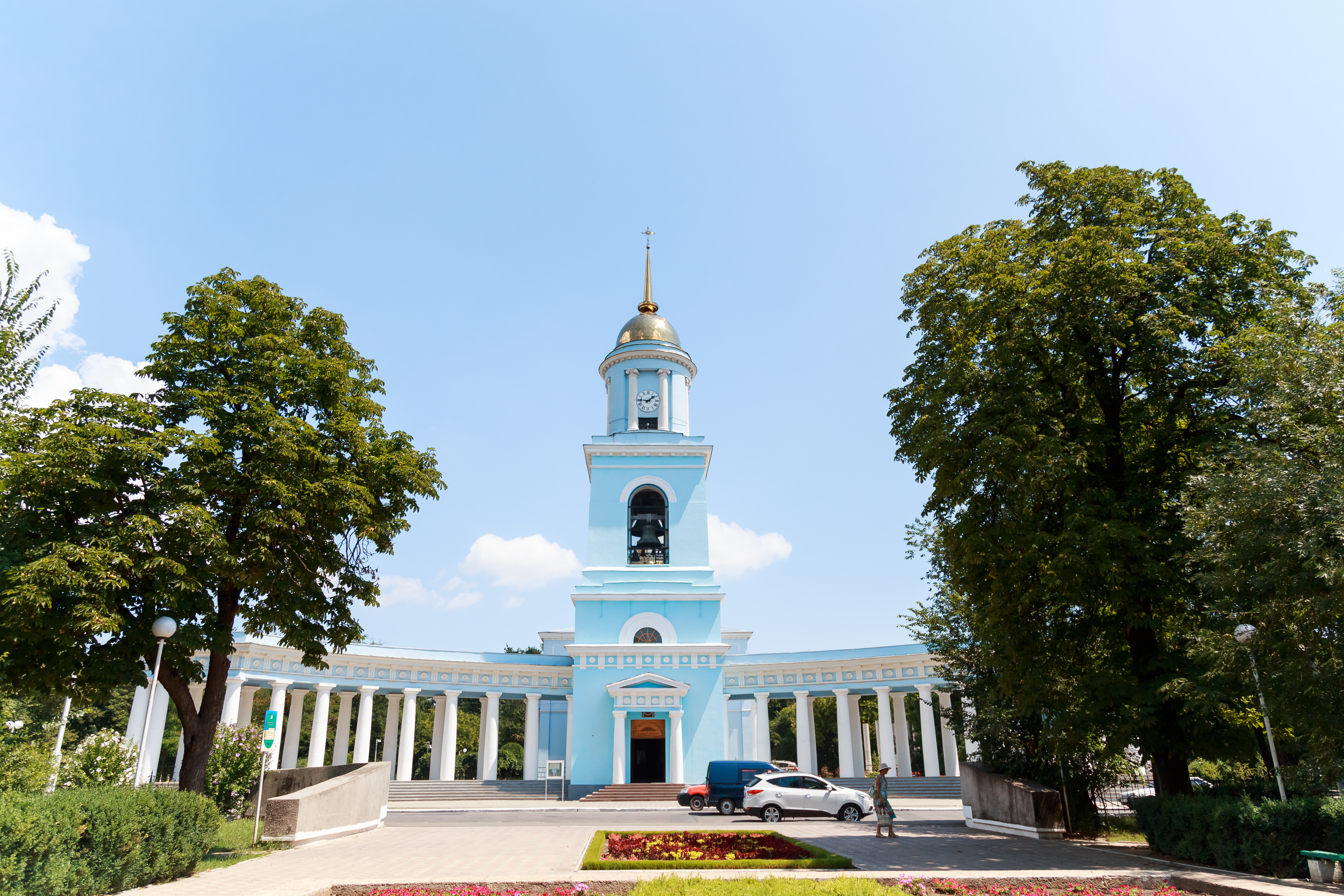 Кафедральний собор Покрова Пресвятої Богородиці і придільна церква Св. Миколая, Ізмаїл, пр-т Суворова, 31